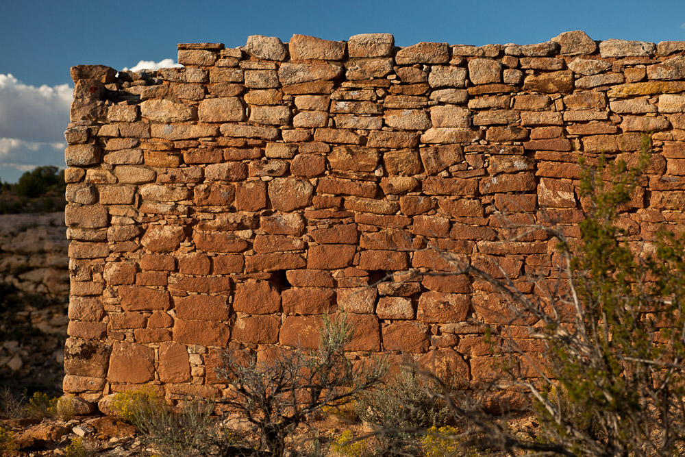 Hovenweep National Monument